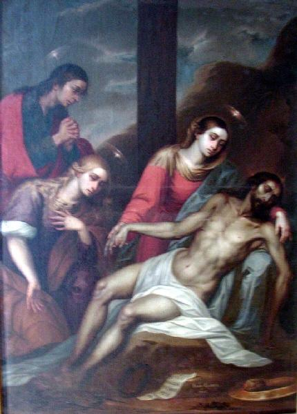 La obra representa a los familiares y discípulos de Jesucristo lamentándose junto a su cadáver. En un primer plano, al pie de la cruz, en el lateral derecho se encuentra la Virgen María con su hijo muerto entre los brazos, a su lado están María Magdalena y San Juan Evangelista, ocupando el lateral izquierdo de la composición. La Virgen con expresión afligida, viste túnica roja, manto azul y un velo envuelve su cabeza. Sobre un paño blanco a aparece Cristo muerto, desudo, cubierto por una paño de pudor.